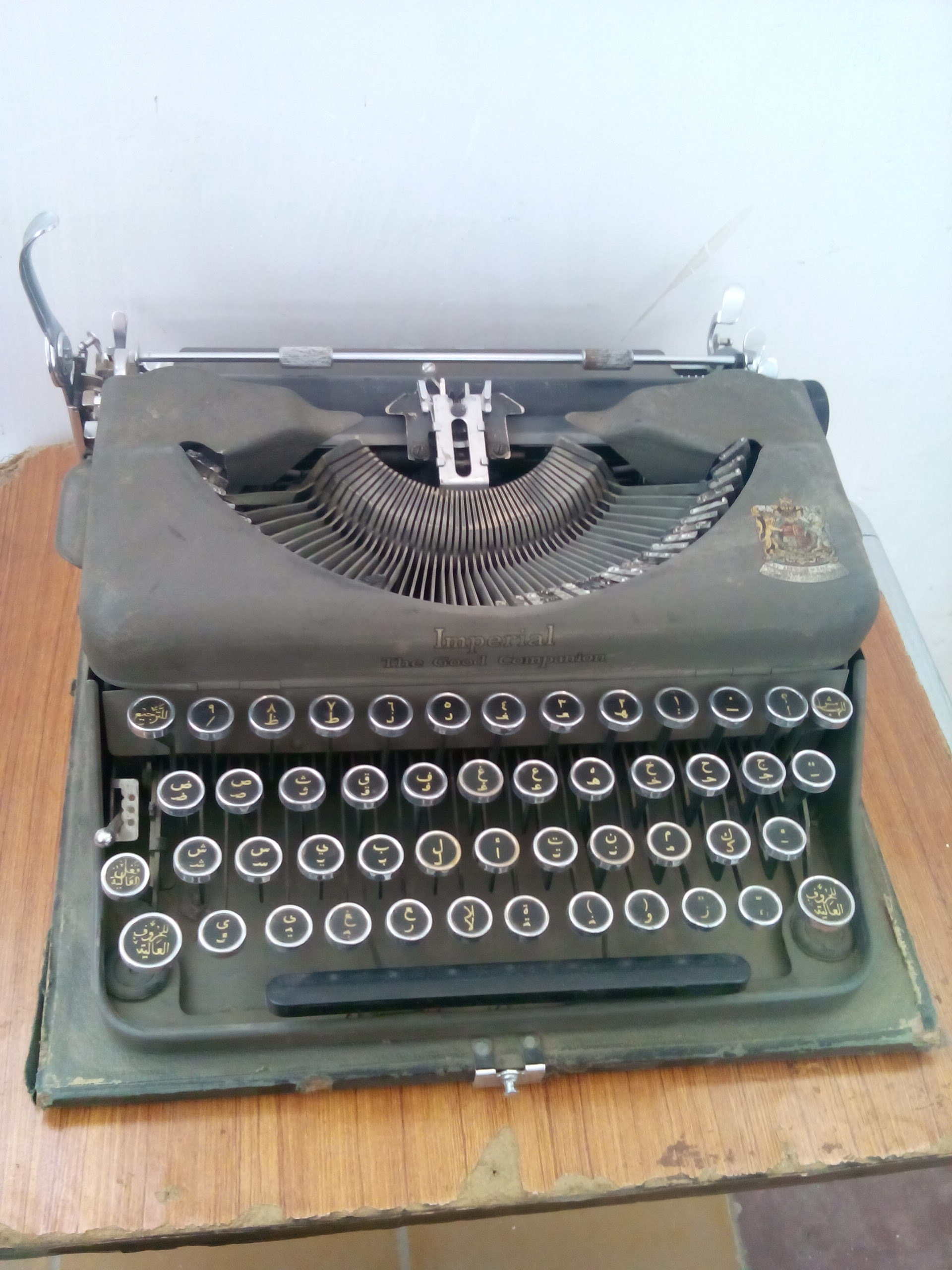 آلة كاتبة مصممة للطباعة باللغة العربية في بغداد